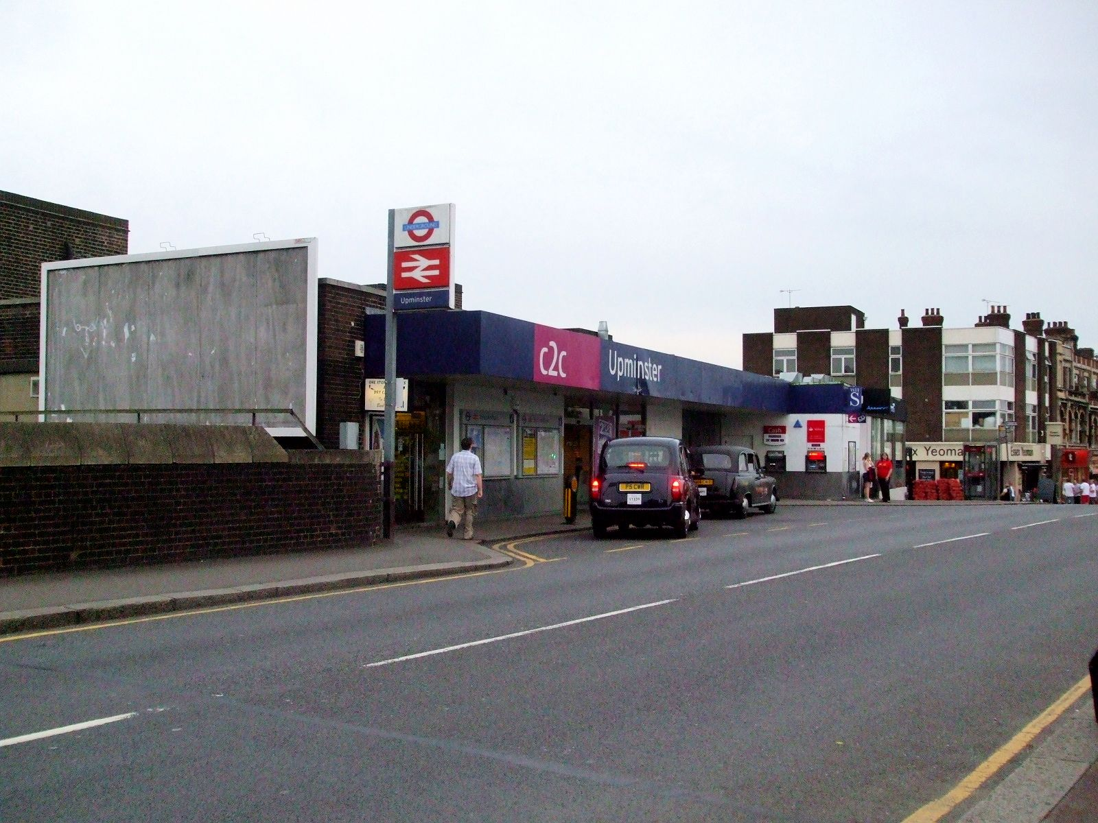 Upminster station main entrance